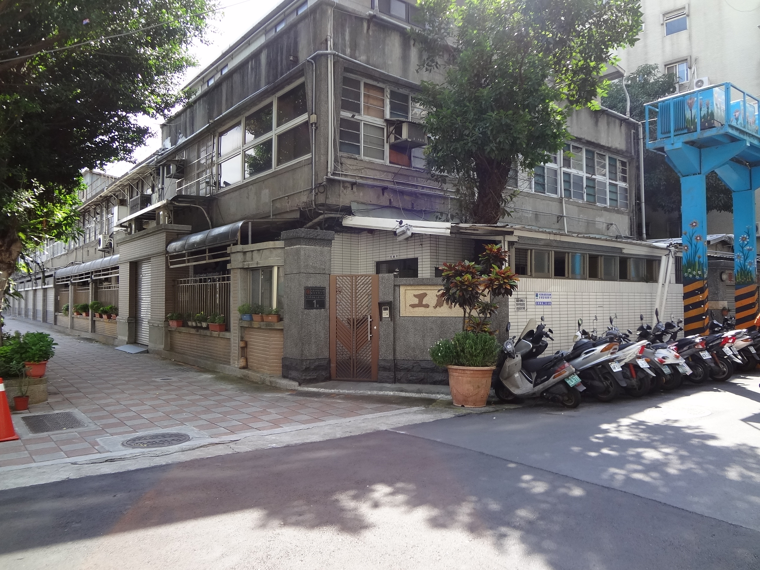 大安工研食品總部，位於臺北市大安區忠孝東路三段10巷1號，大門右側鑲嵌「工研醋」石碑。